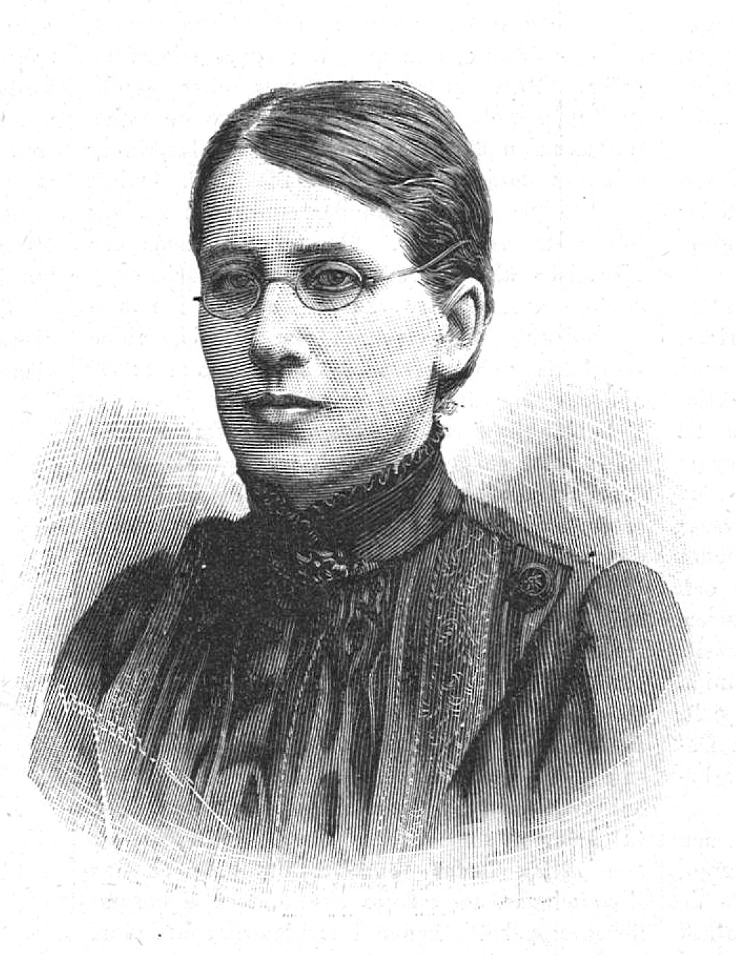 Alice Bonthron (1851-1928)